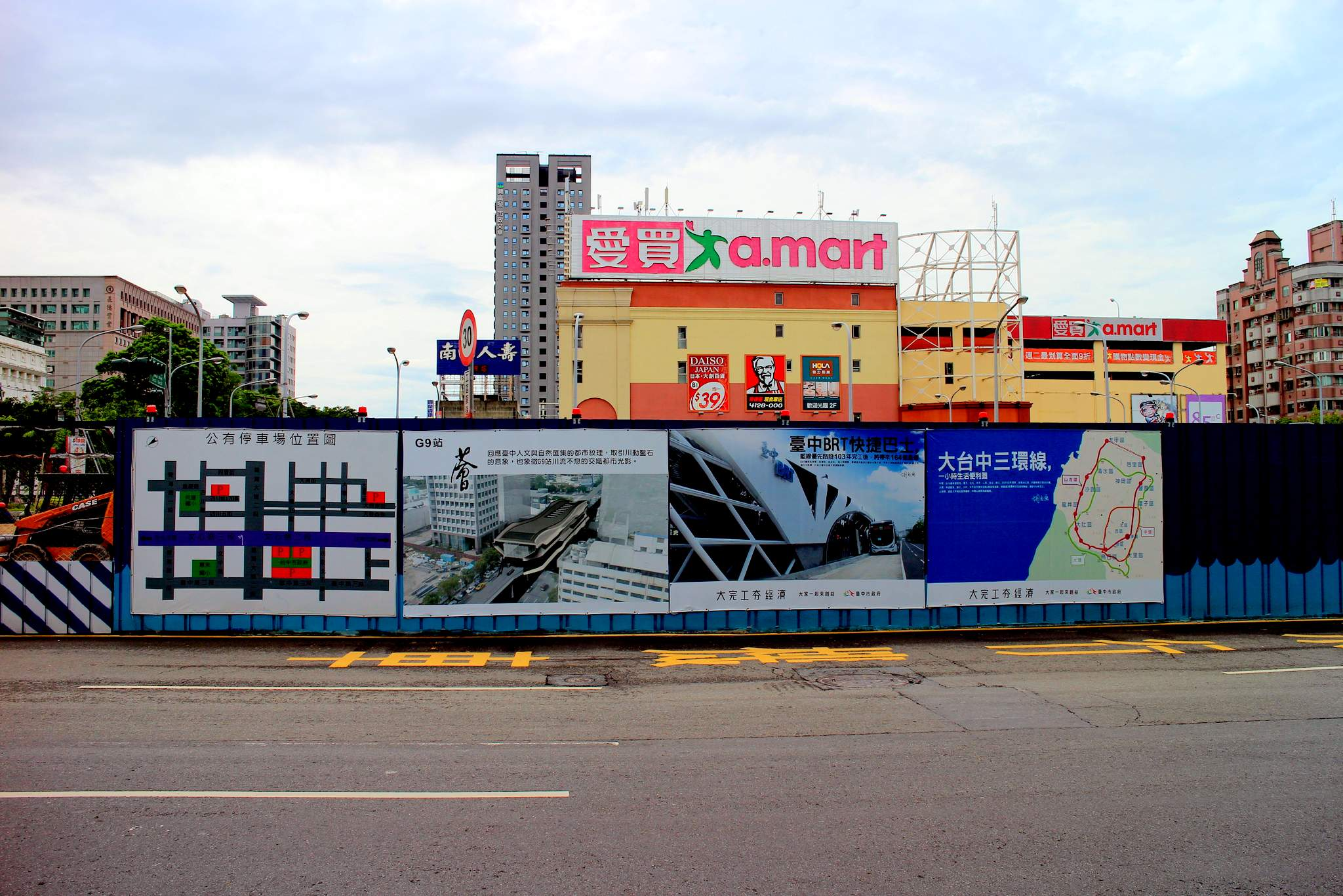 中文（台灣）: 興建中的台中捷運綠線-G9市府站